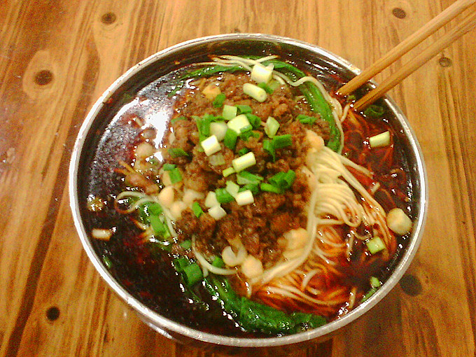 重庆特色小吃——小面（豌豆杂酱面）